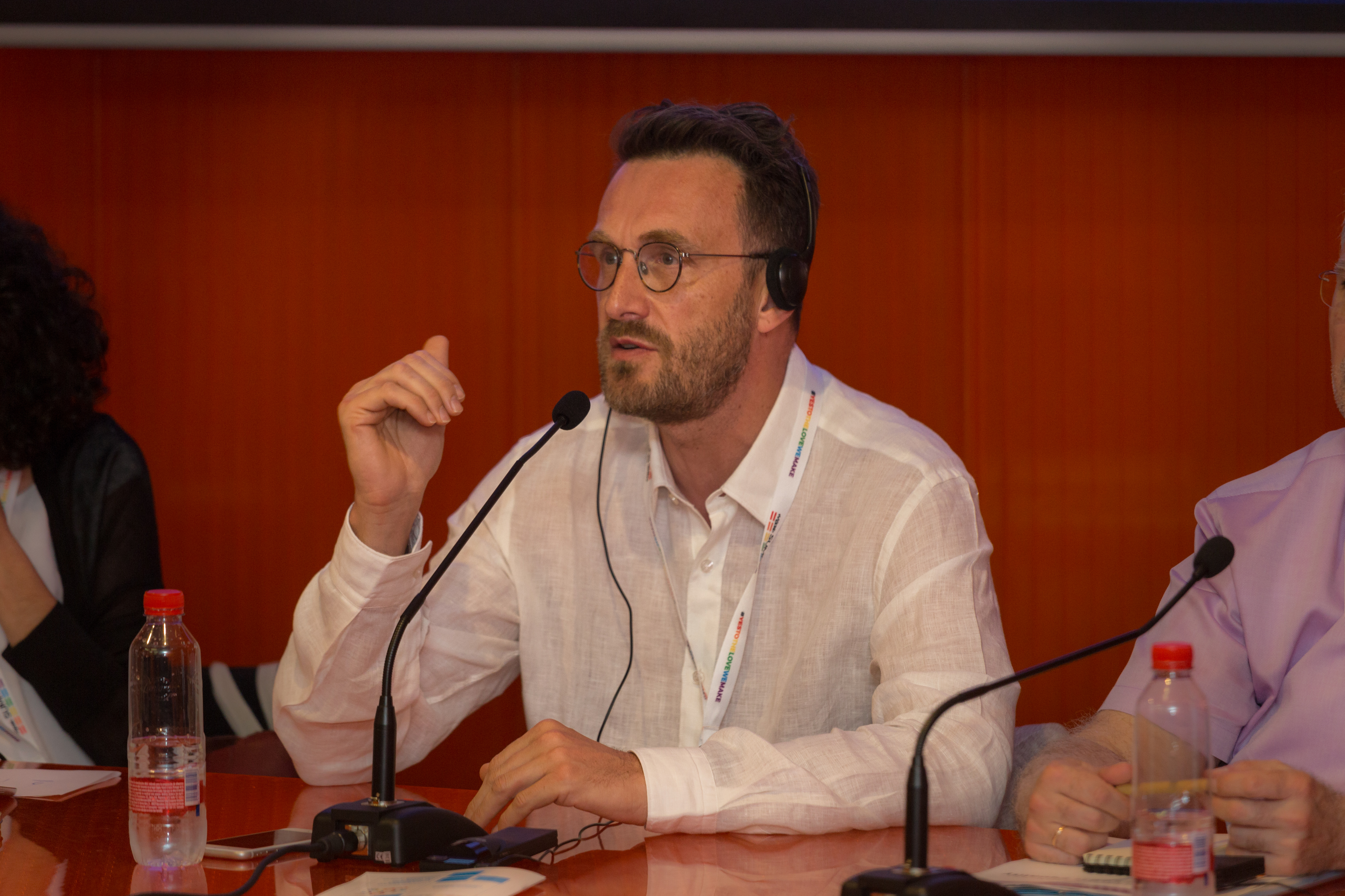 Pascal Smet. Madrid Summit. WorldPride 2017 Madrid.